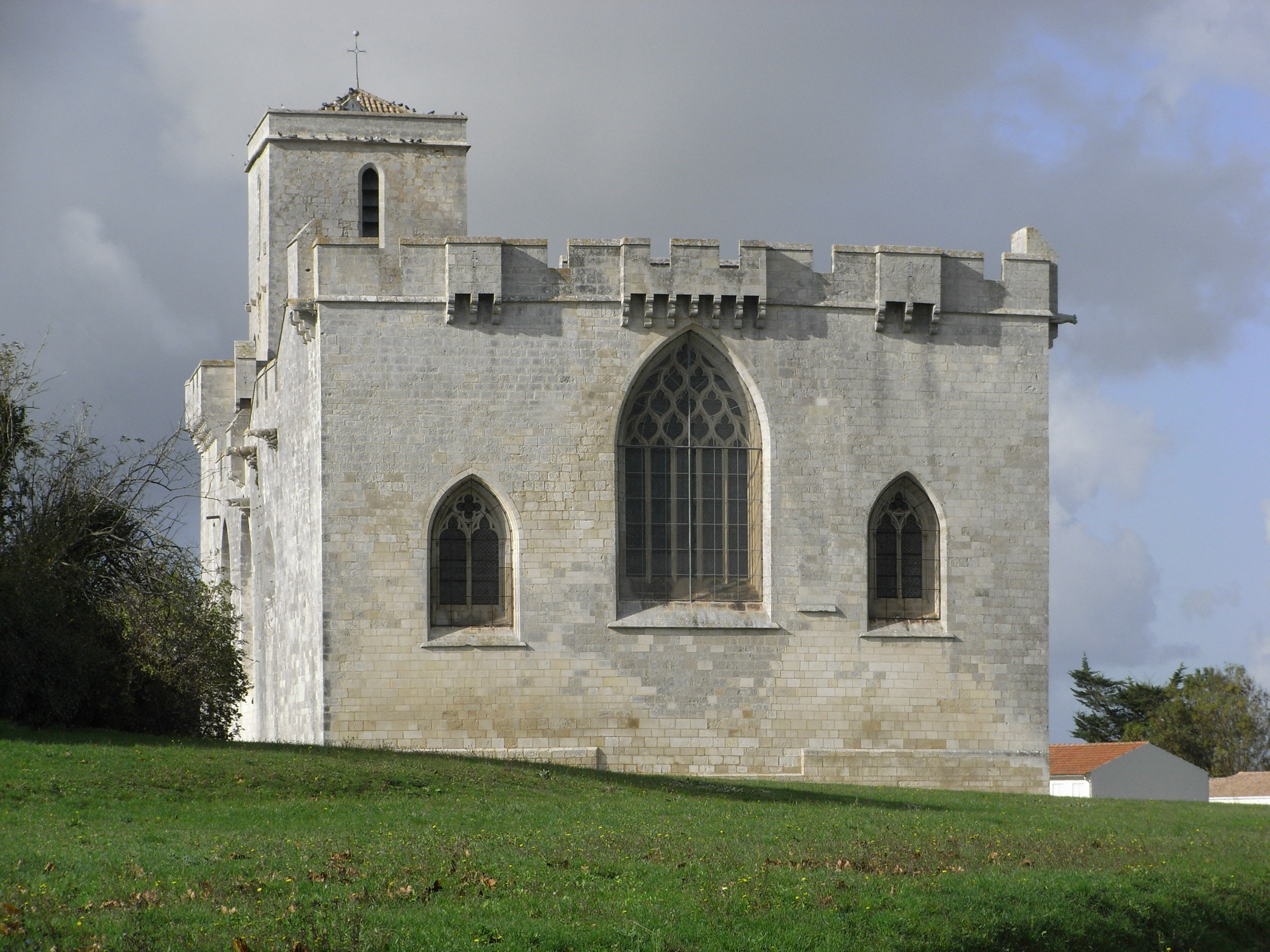 Église Saint-Martin à Esnandes en Charente-maritime (France).